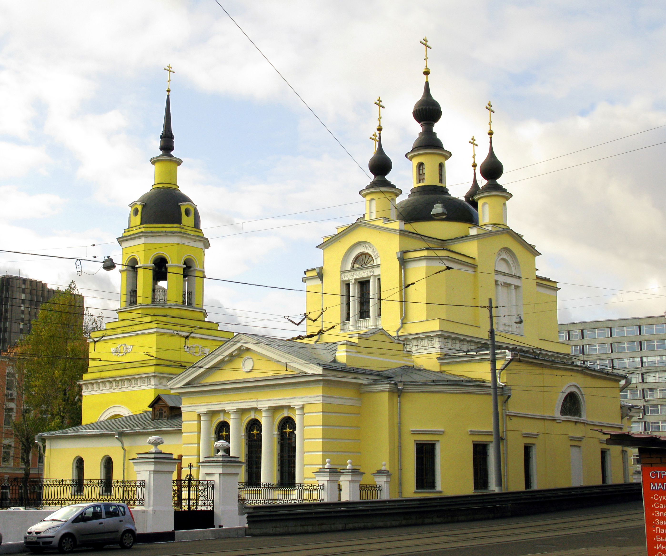 Храм Покрова Пресвятой Богородицы в Красном селе